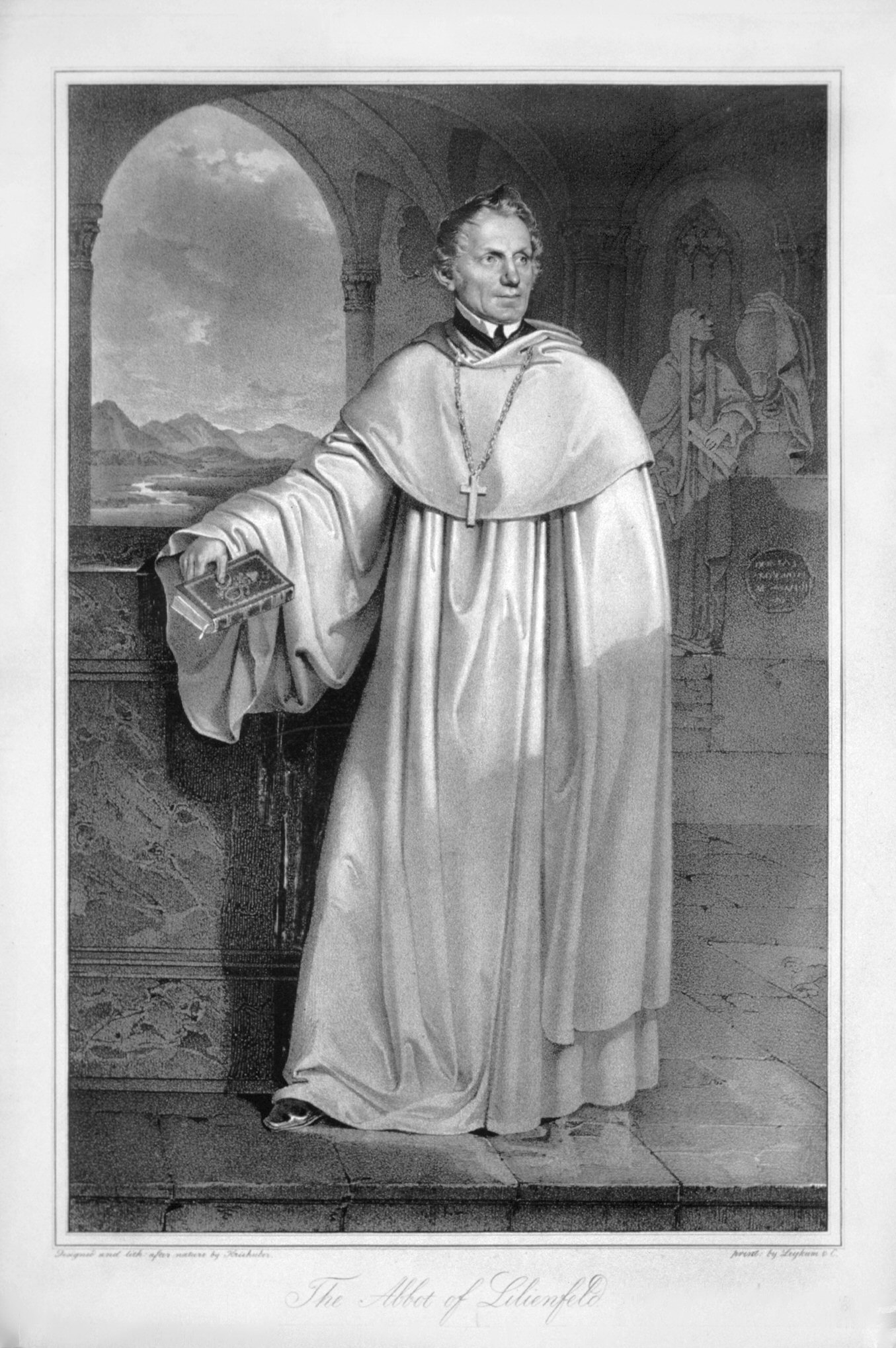 Ambros Becziczka (1780-1861). Seit 1825 Abt der Zisterzienser-Abtei Lilienfeld. Lithographie von Josef Kriehuber, ca. 1860. Literatur: Wolfgang von Wurzbach: Katalog der Porträtlithograpjhien Josef Kriehubers. Walter Krieg Verlag 1955. Nr. 143